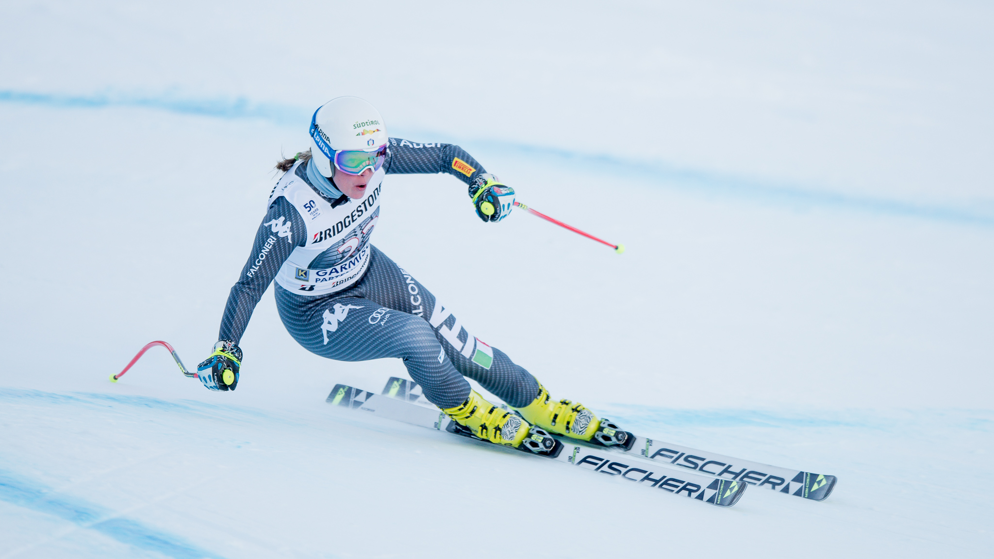 64. Kandahar Rennen,Audi FIS Ski Weltcup Garmisch-Partenkirchen,Damen Abfahrt,Kandahar,Ladies Downhill,Verena Stuffer